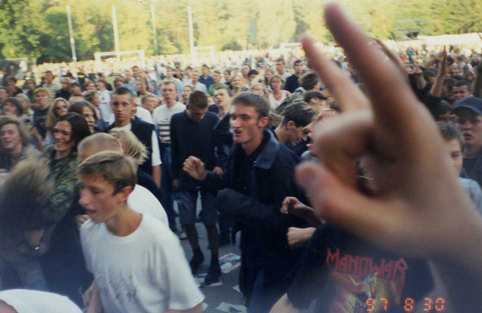 Rock festival in Vilnius, Lithuania (Roko Maršas 1997)